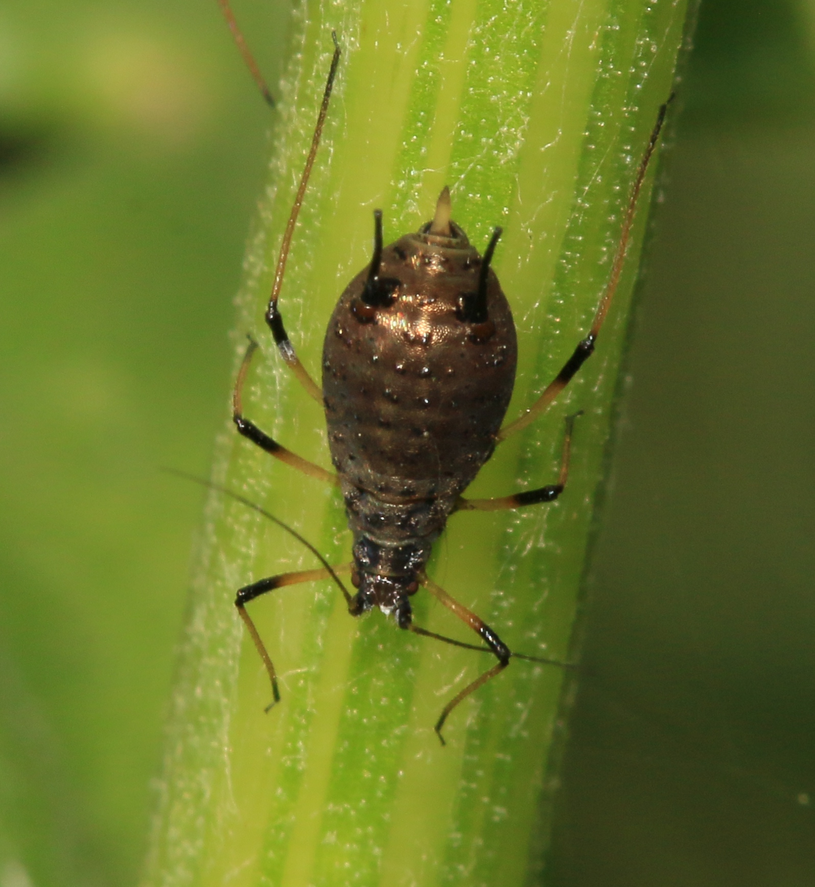 Ref